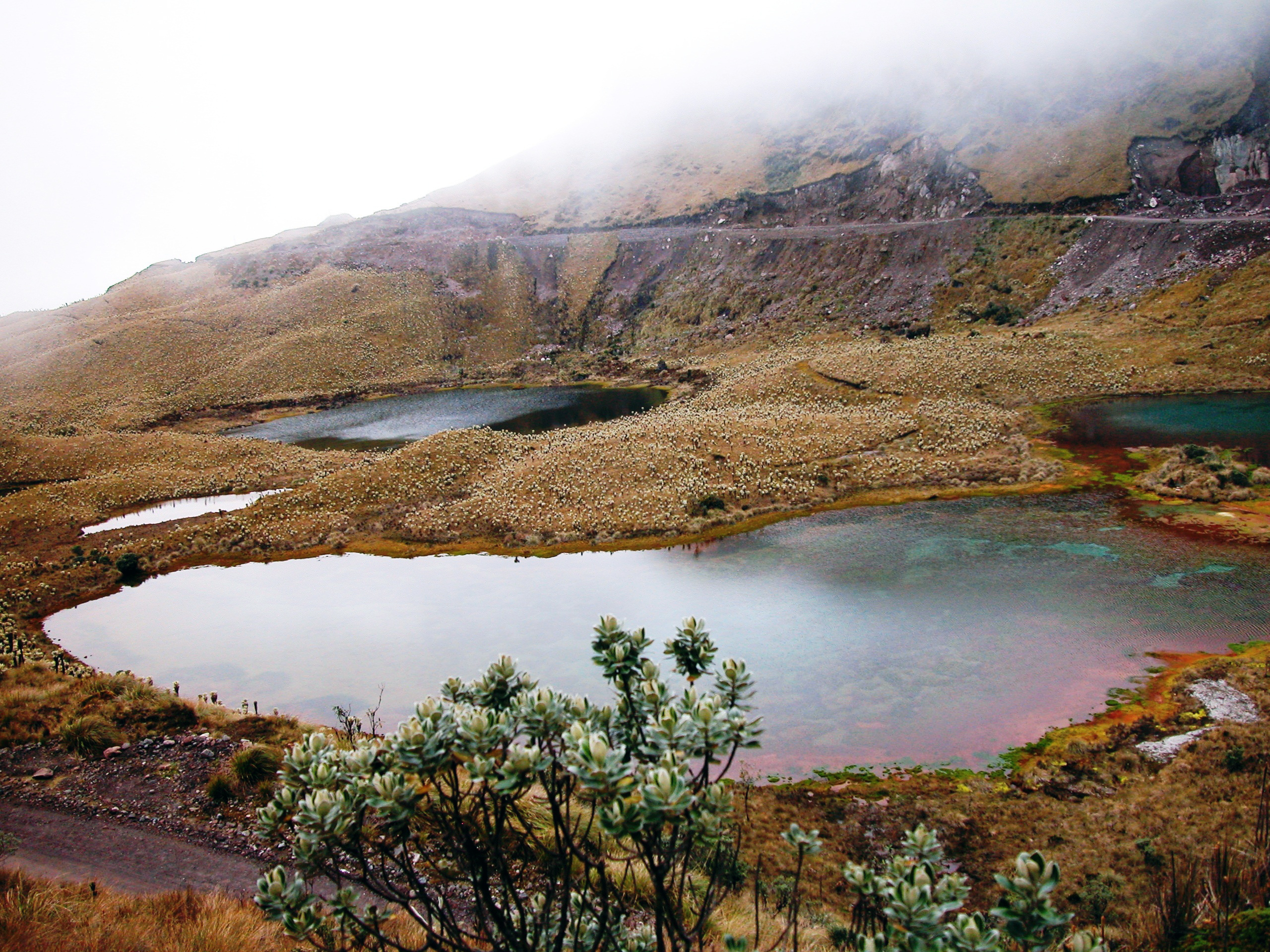 Lagunas Verdes prov Carchi